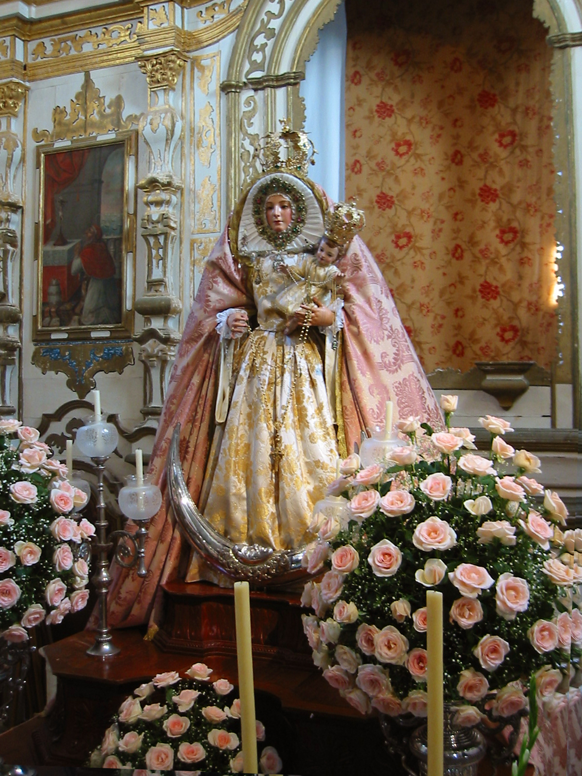 Virgen del Rosario, Güímar, Canarias